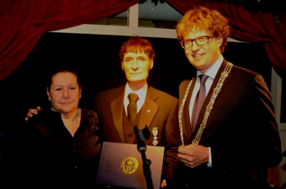 Ridderschap in de Orde van Oranje Nassau voor Jeffry Bonnet